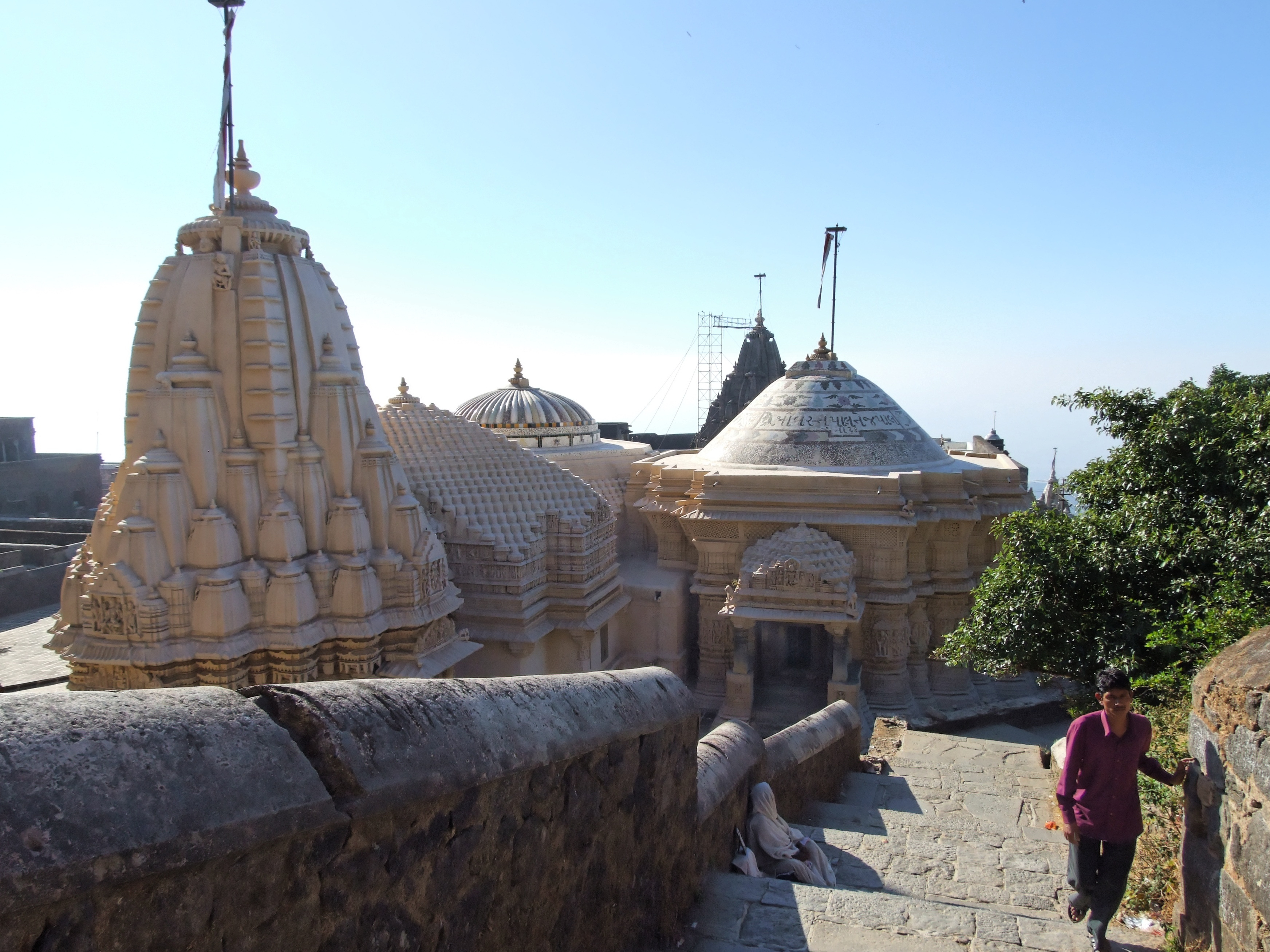 Junagah - Girnar, Gujarat - India